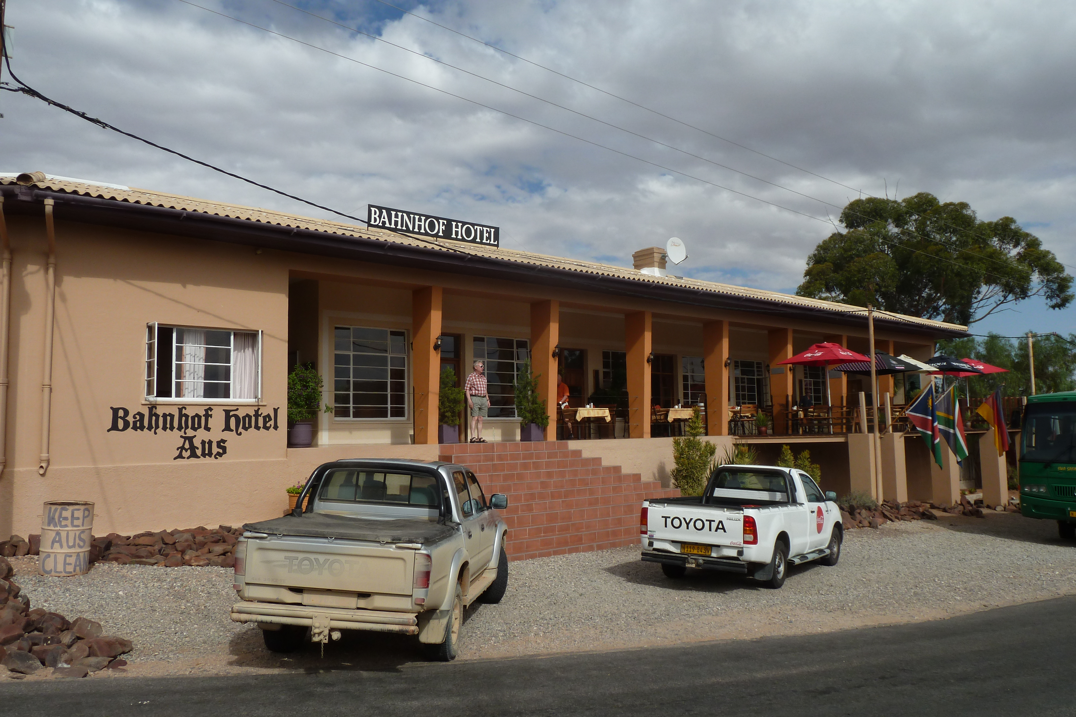 Ehemaliger Bahnhof Aus, Namibia